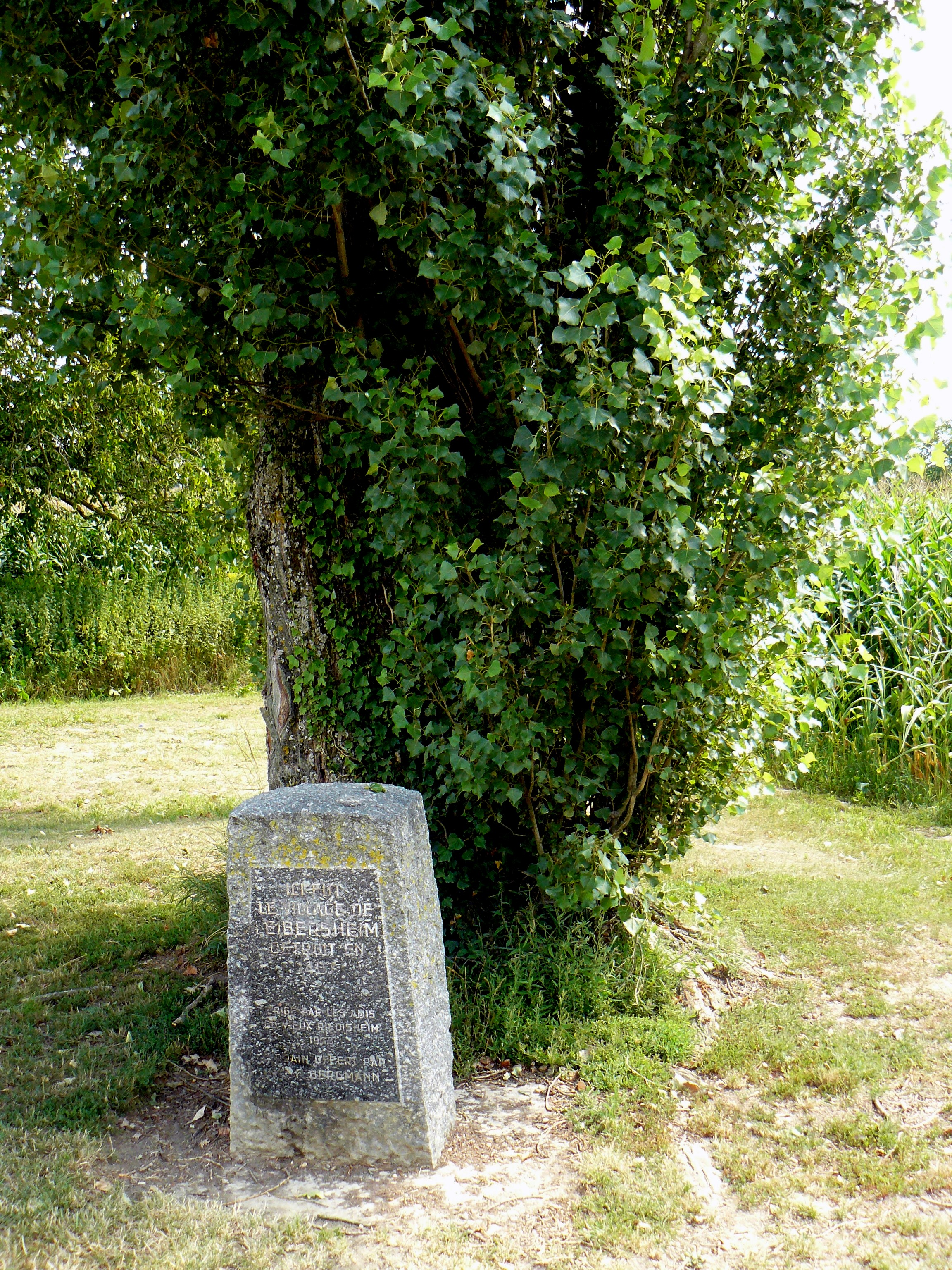 Monument marquant l'emplacement du village disparu de Leibersheim, à Riedisheim (Haut-Rhin, France)